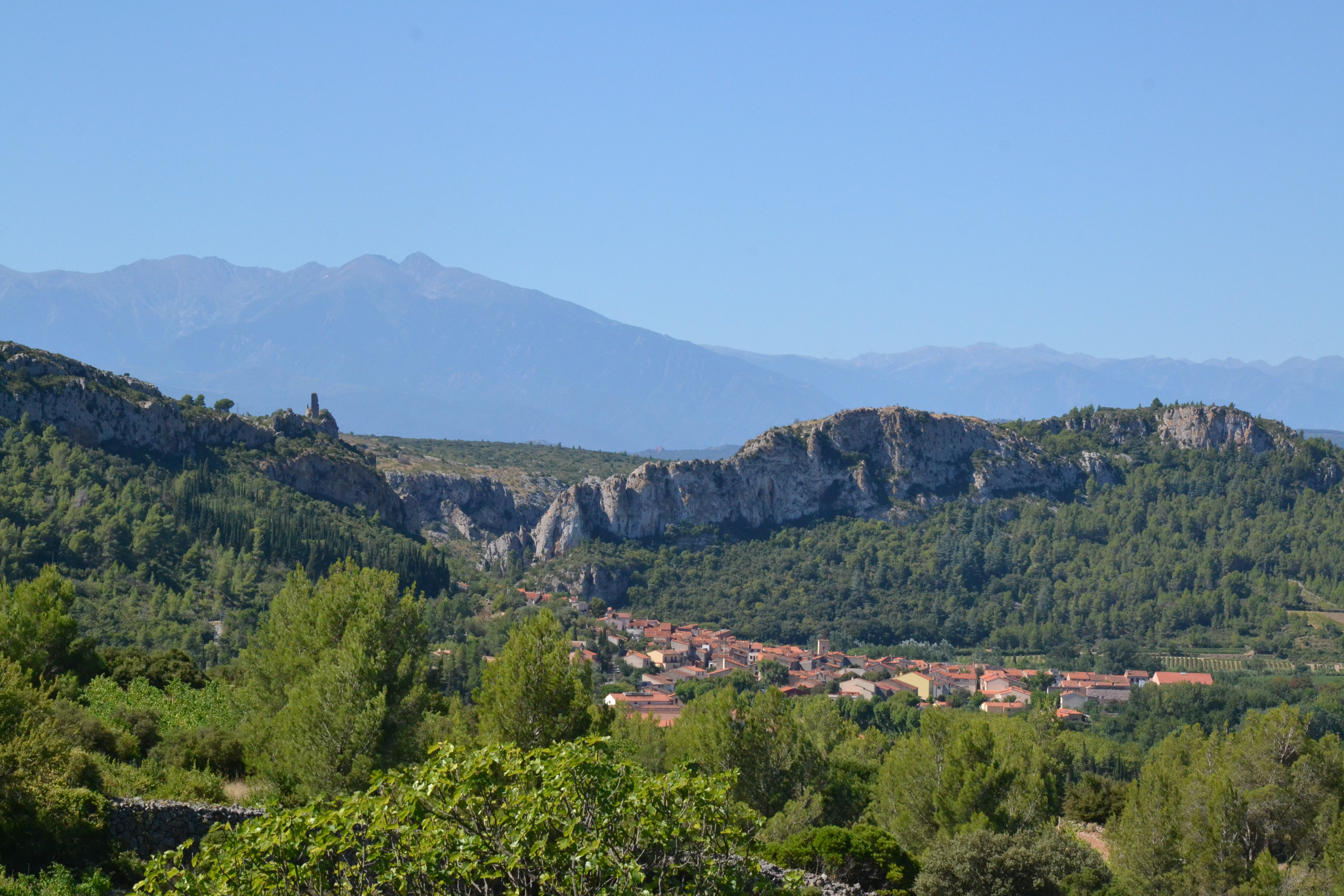 Tautavel et le Canigou (Pyrénées-Orientales, France).